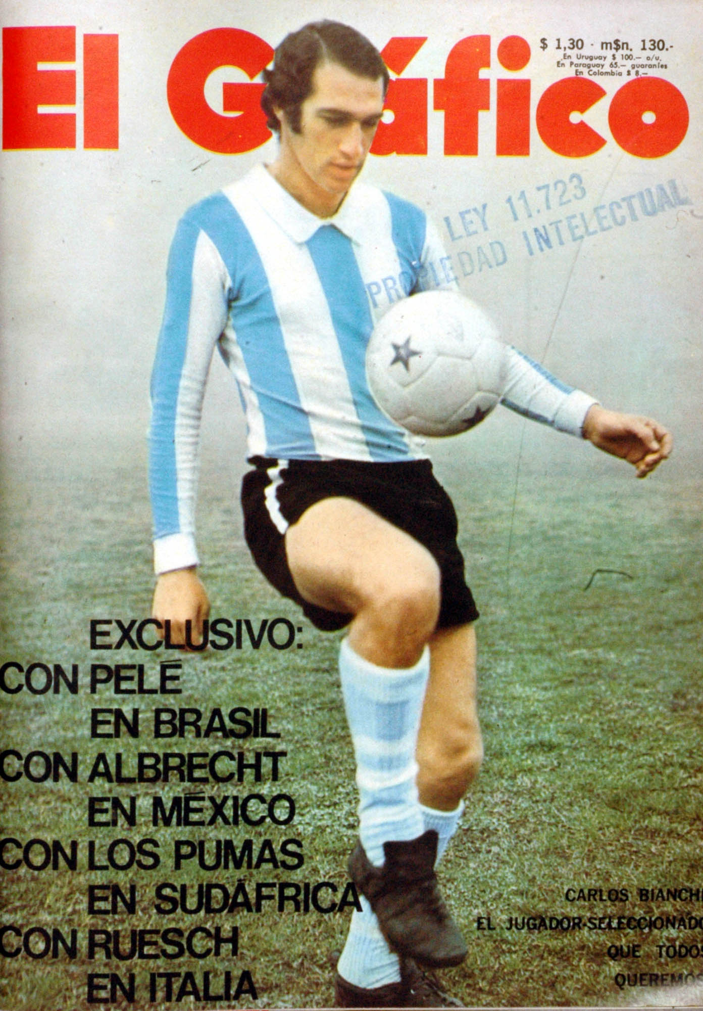 El Grafico del 27 de Julio de 1971. Edicion 2703